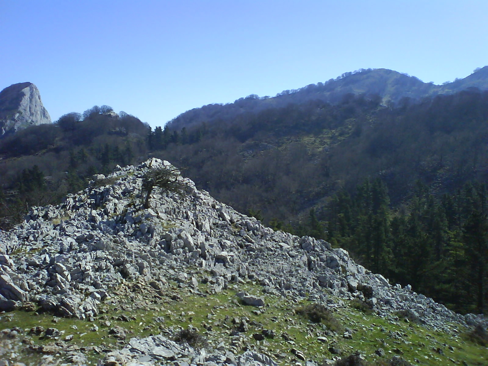 Sierra de Aramotz, a la izquierda se ve el Mugarra Vizcaya, País Vasco, España